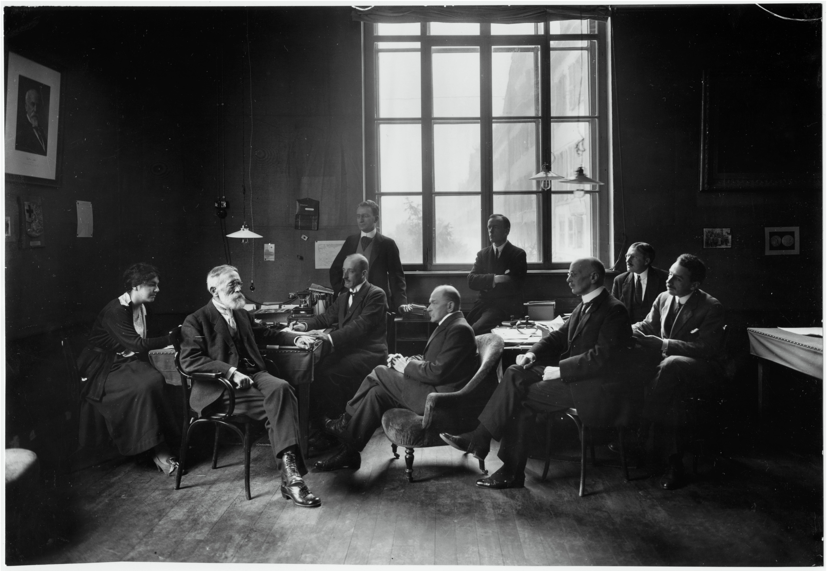 Guerre 1914-1918. Genève, Musée Rath, Agence internationale des prisonniers de guerre. La Commission de Direction de l'Agence en séance. De gauche à droite: Mlle Renée-Marguerite Cramer, Dr. Frédéric Ferrière, Georges Werner, K. de Watteville, Alfred Gautier, Frédéric Barbey, Edmond Boissier, Etienne Clouzot, Jacques Chenevière.